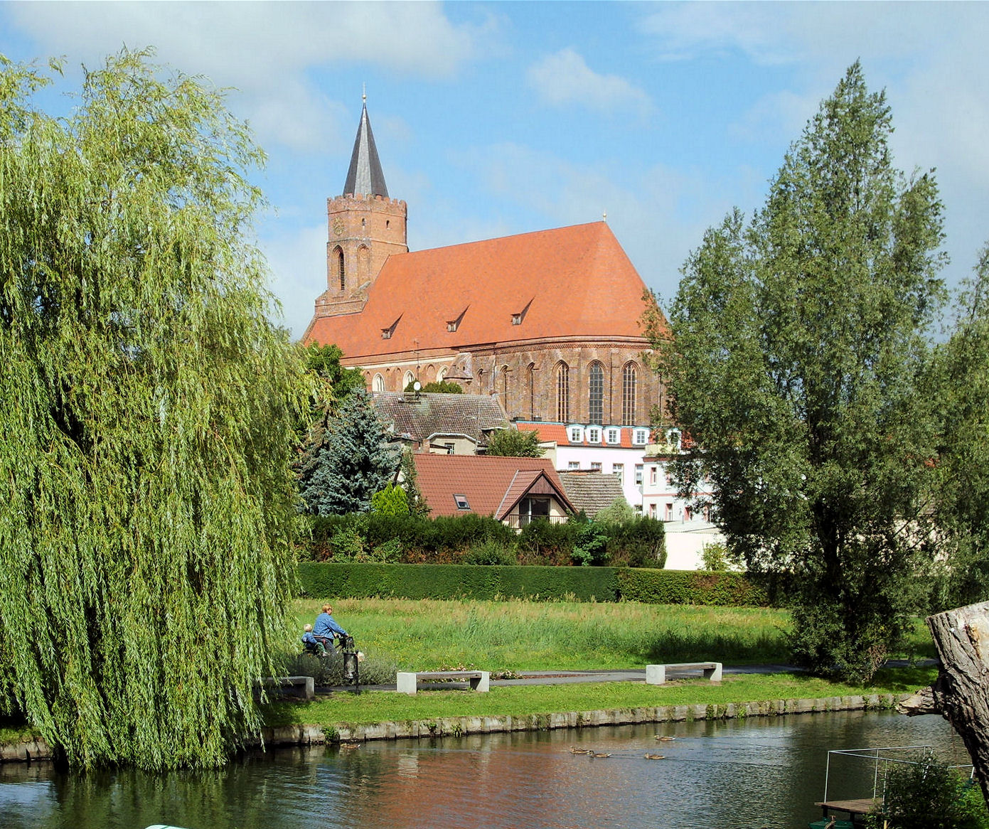 Marienkirche in Beeskow, Deutschland, fotografiert von der Spreeinsel (Fischerkiez) aus.